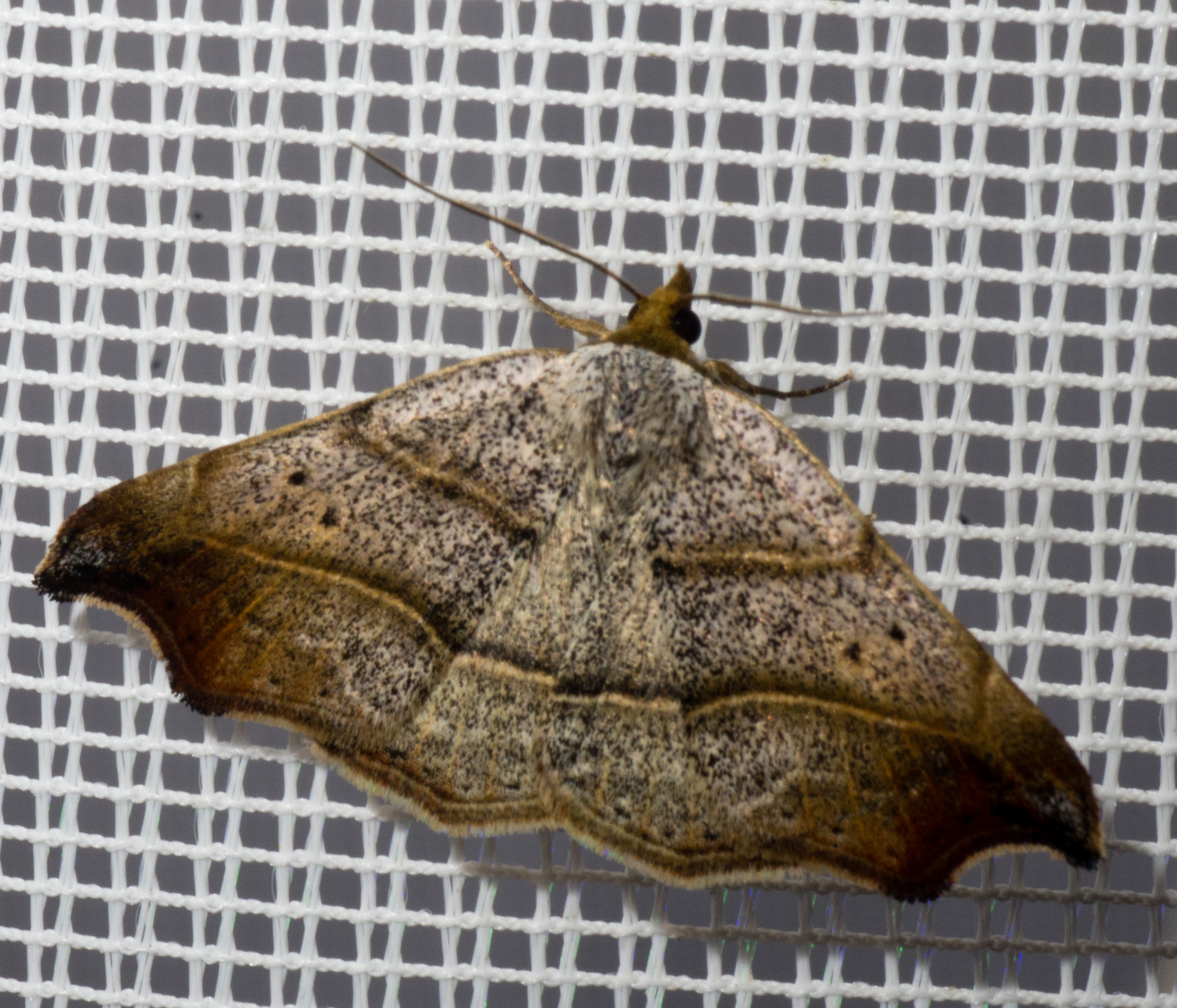 Laspeyria flexula (Tribus: Aventiini; Unterfamilie Boletobiinae; Familie Erebidae)